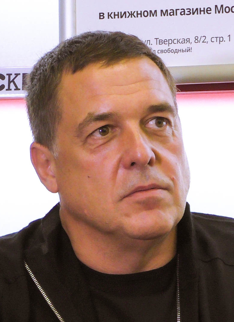 20.10.2017. Александр Любимов в книжном магазине "Москва".